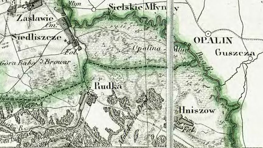 Rudka (powiat chełmski) na mapie topograficznej Królestwa Polskiego z 1839 roku